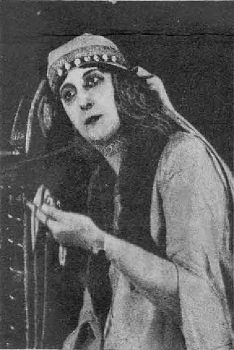 Marija Vera leta 1924 v Župančičevi tragediji Veronika Deseniška kot Jelisava Frankopanka